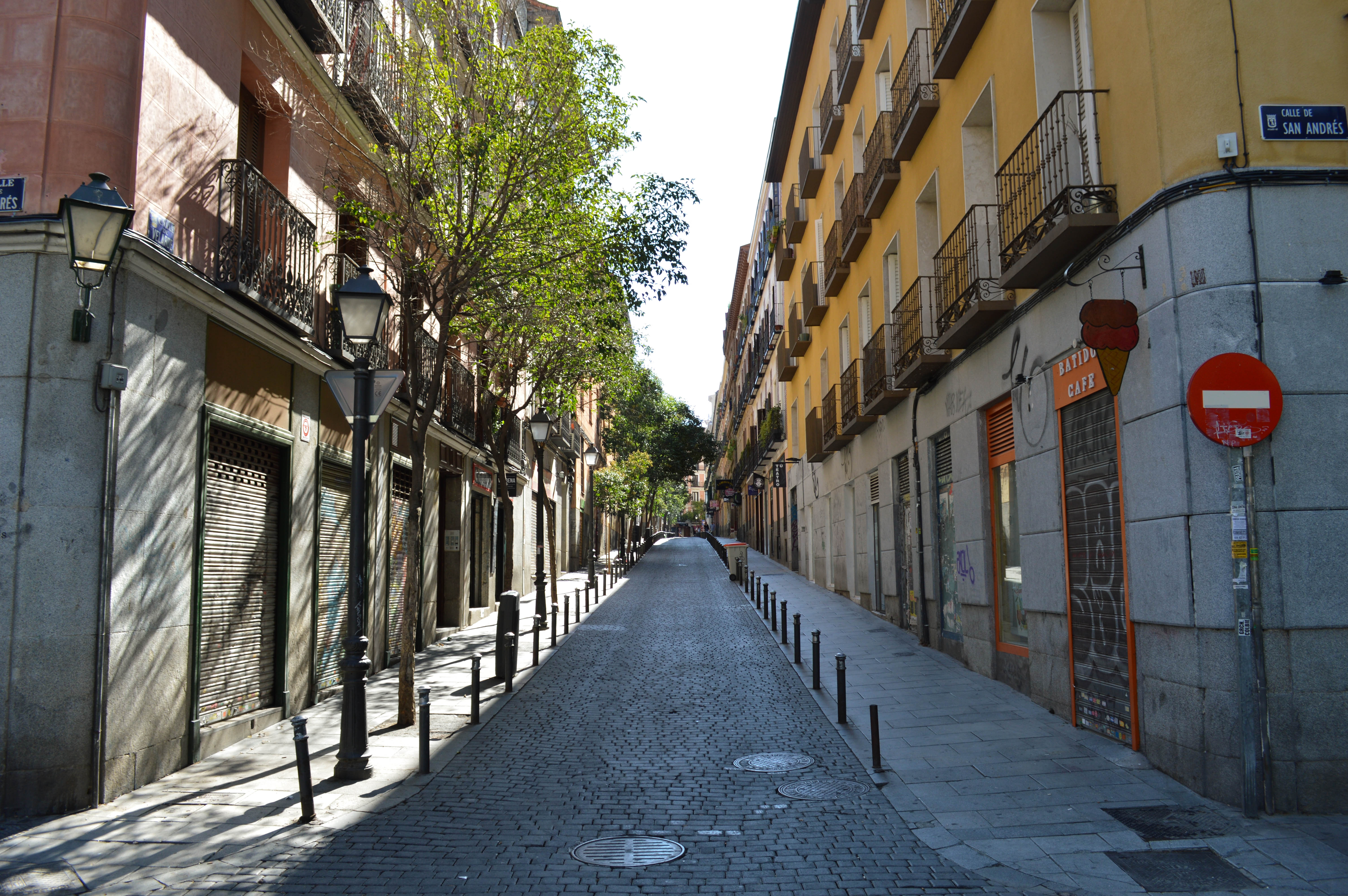 Calle Velarde